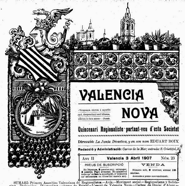 Capçalera del quinzenari "València Nova"